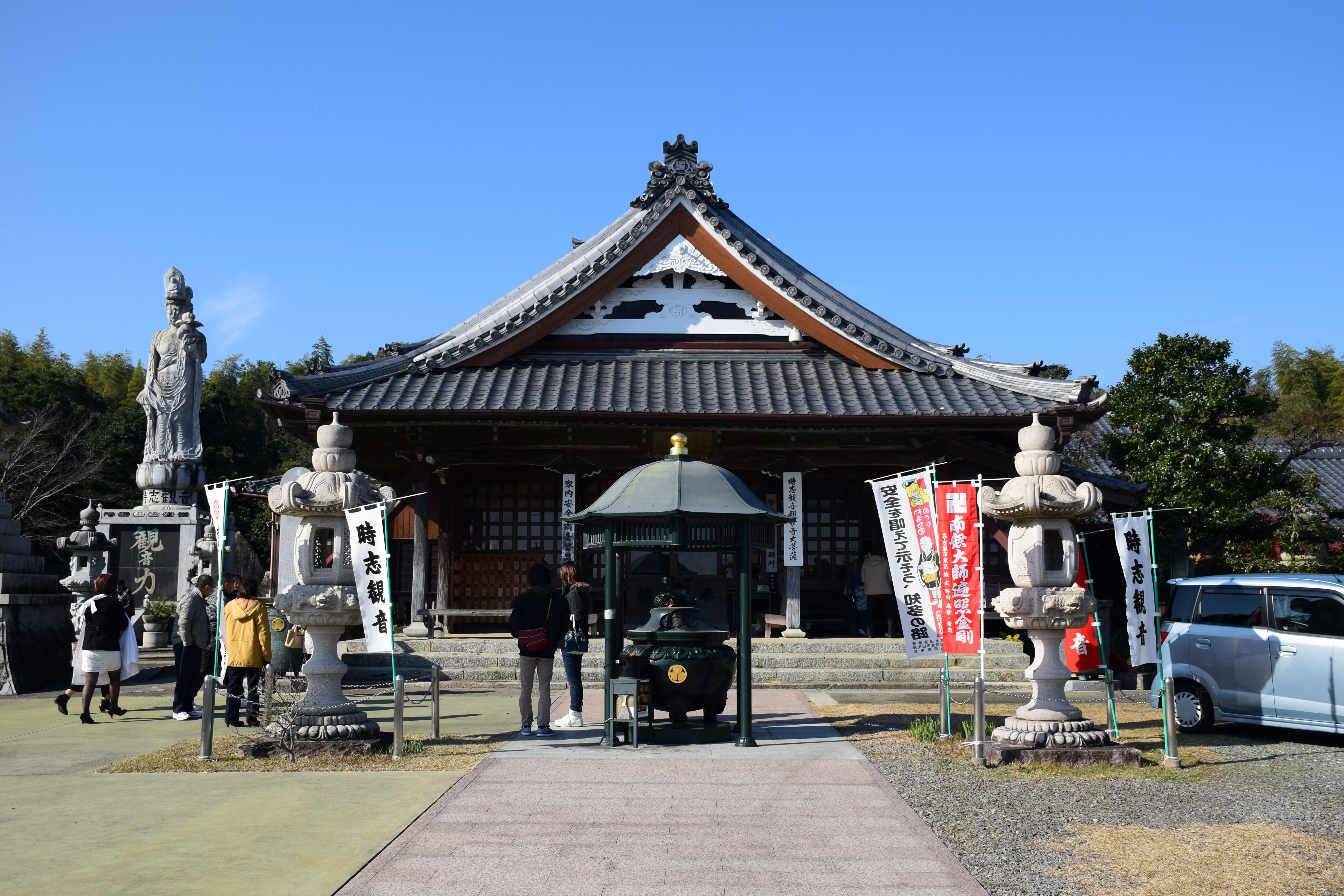 時志観音本堂